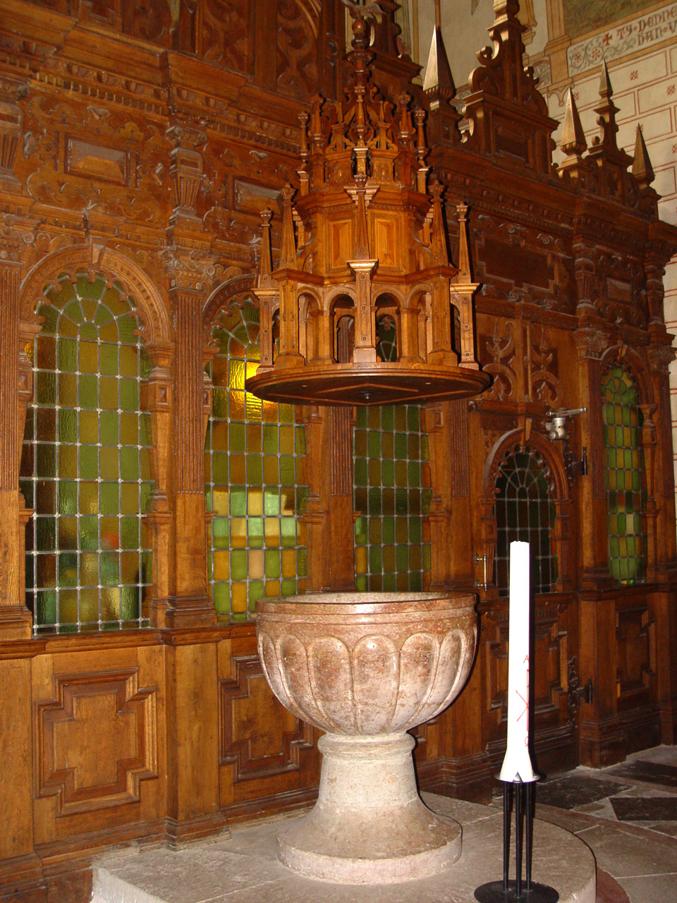 Dalhems kyrka (Gotland), Taufbecken (13.Jh.)